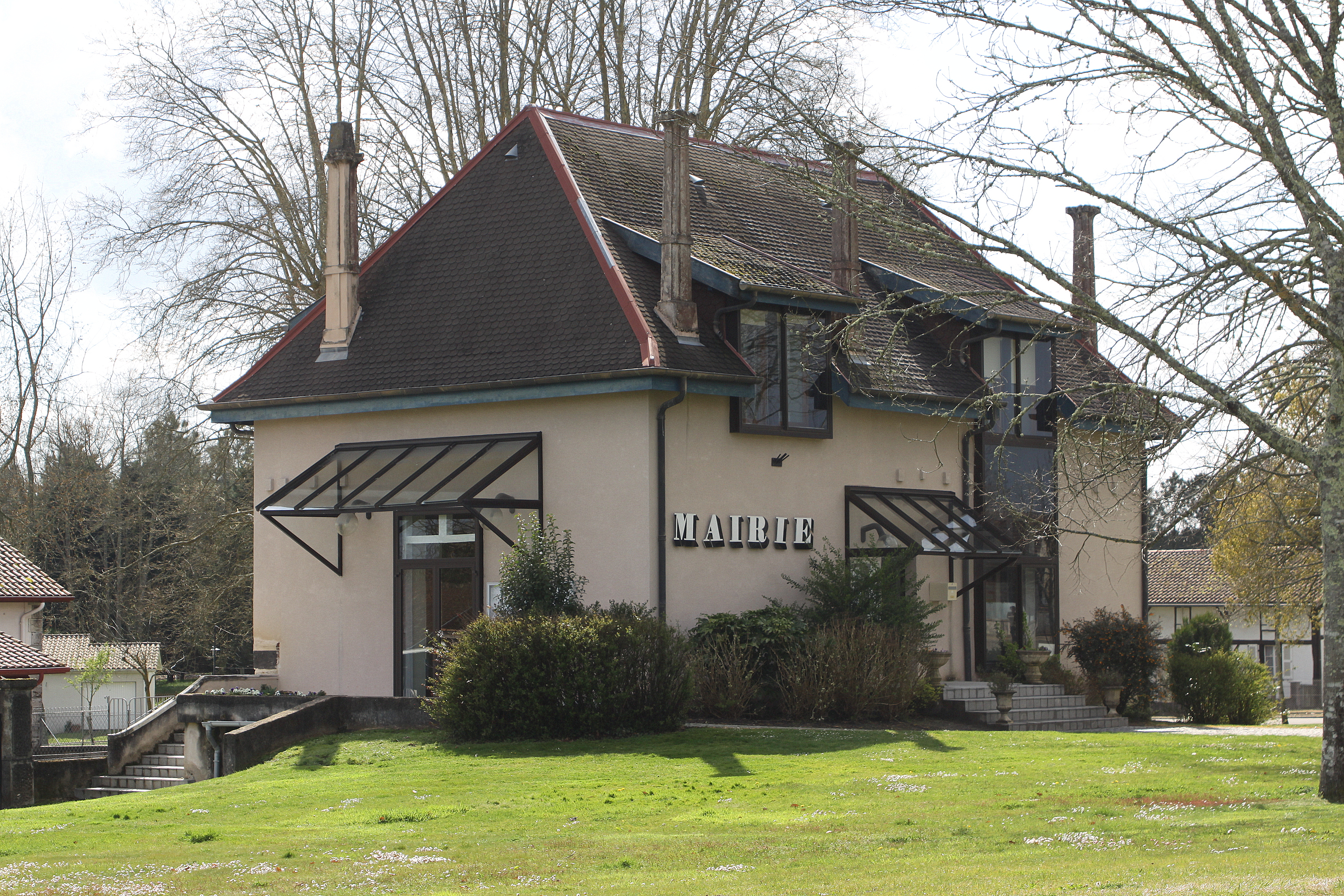 D'Mairei vu Lesgor